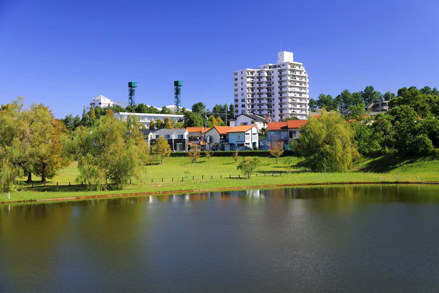 西池（豊明市前後町、2018年（平成30年）10月）